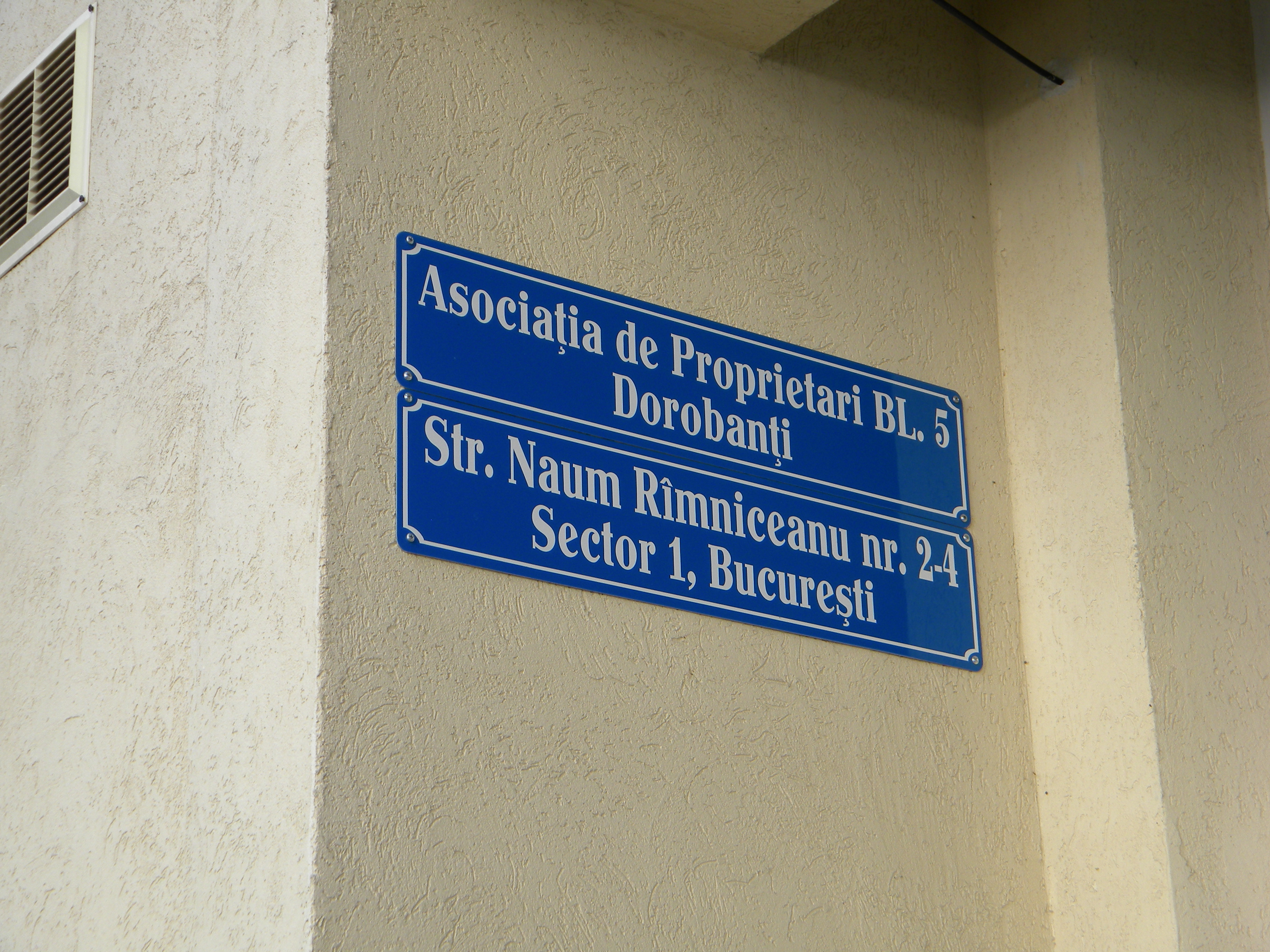 Bucuresti, Romania, Imobil 2-4 pe Str. Naum Ramniceanu; B-II-m-B-19521 si B-II-m-B-19523